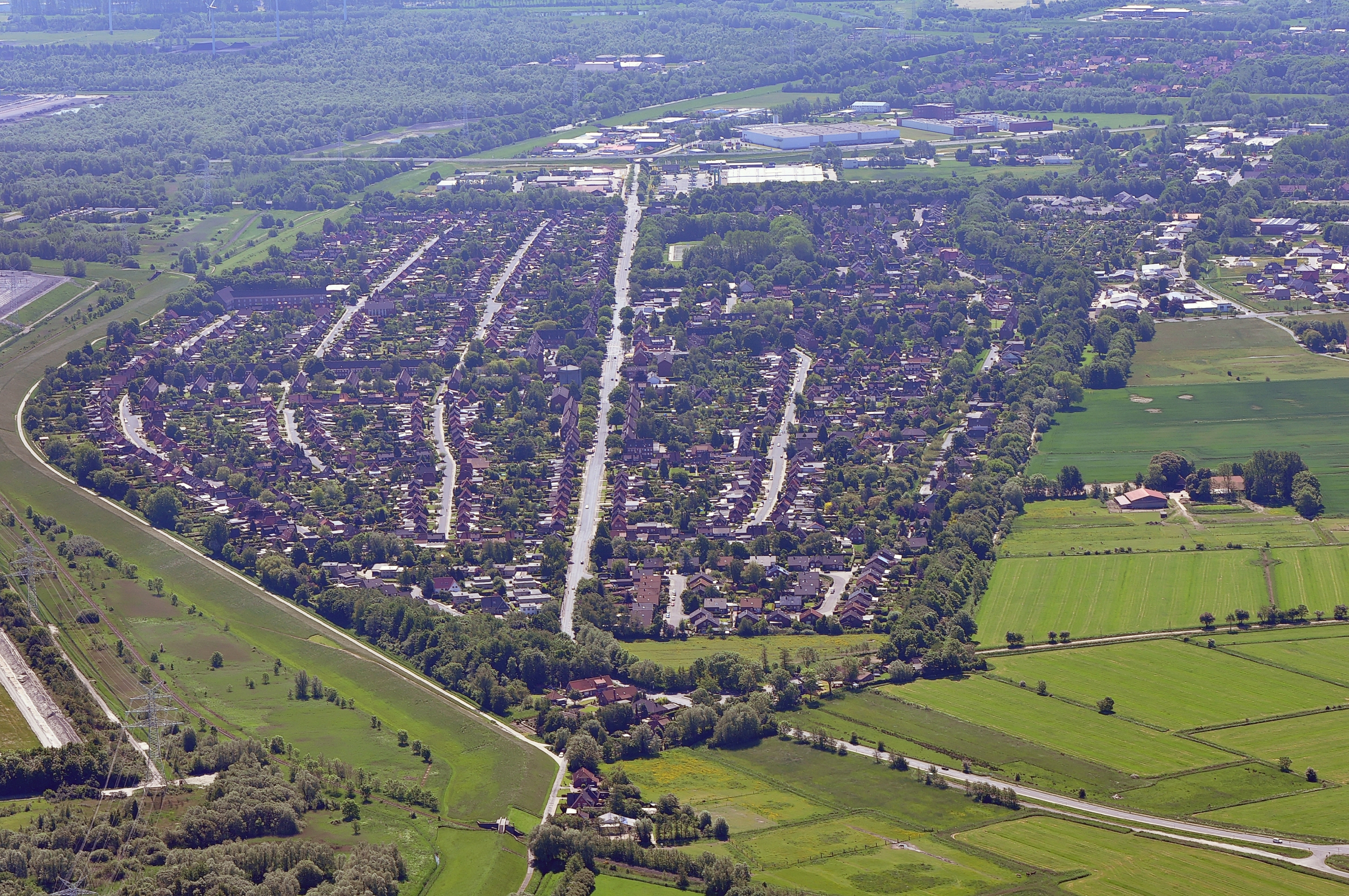 Luftbilder von der Nordseeküste 2012-05